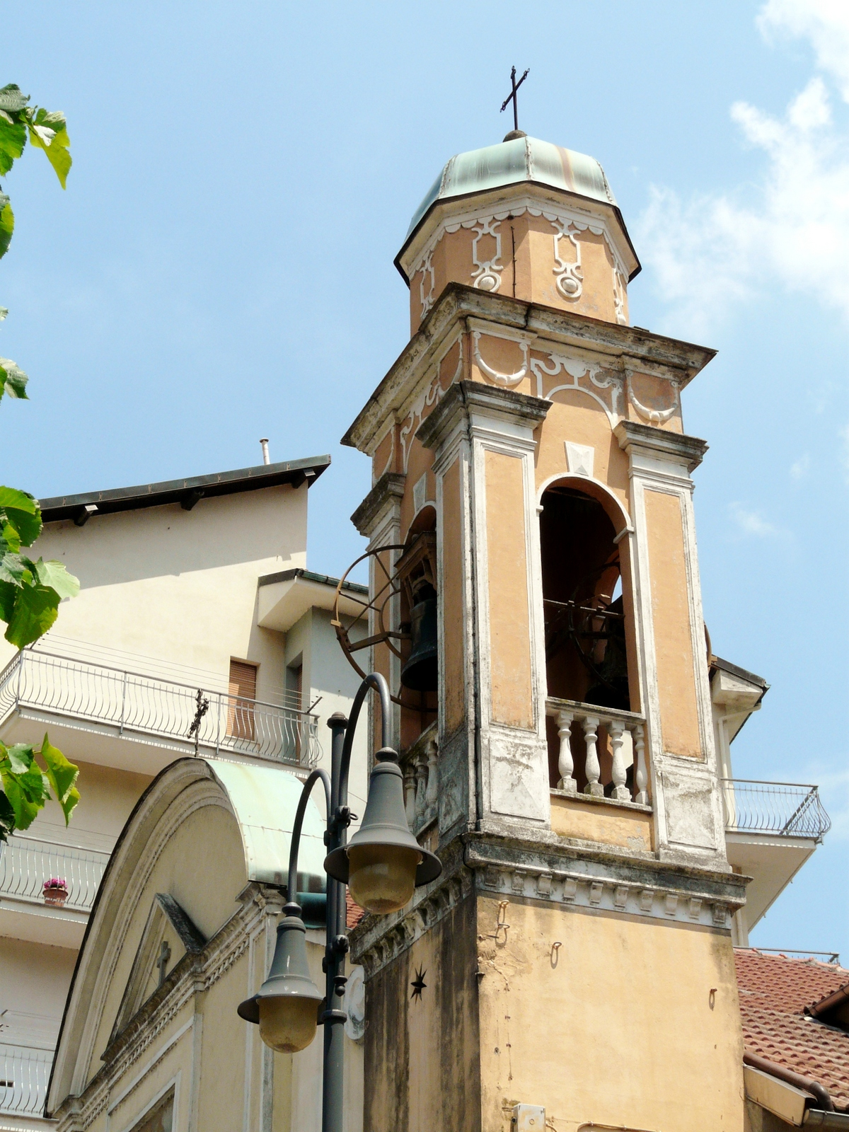 Oratorio di San Sebastiano, Rossiglione, Liguria, Italia